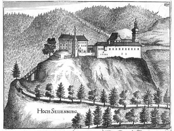 Hoch Seisenburg